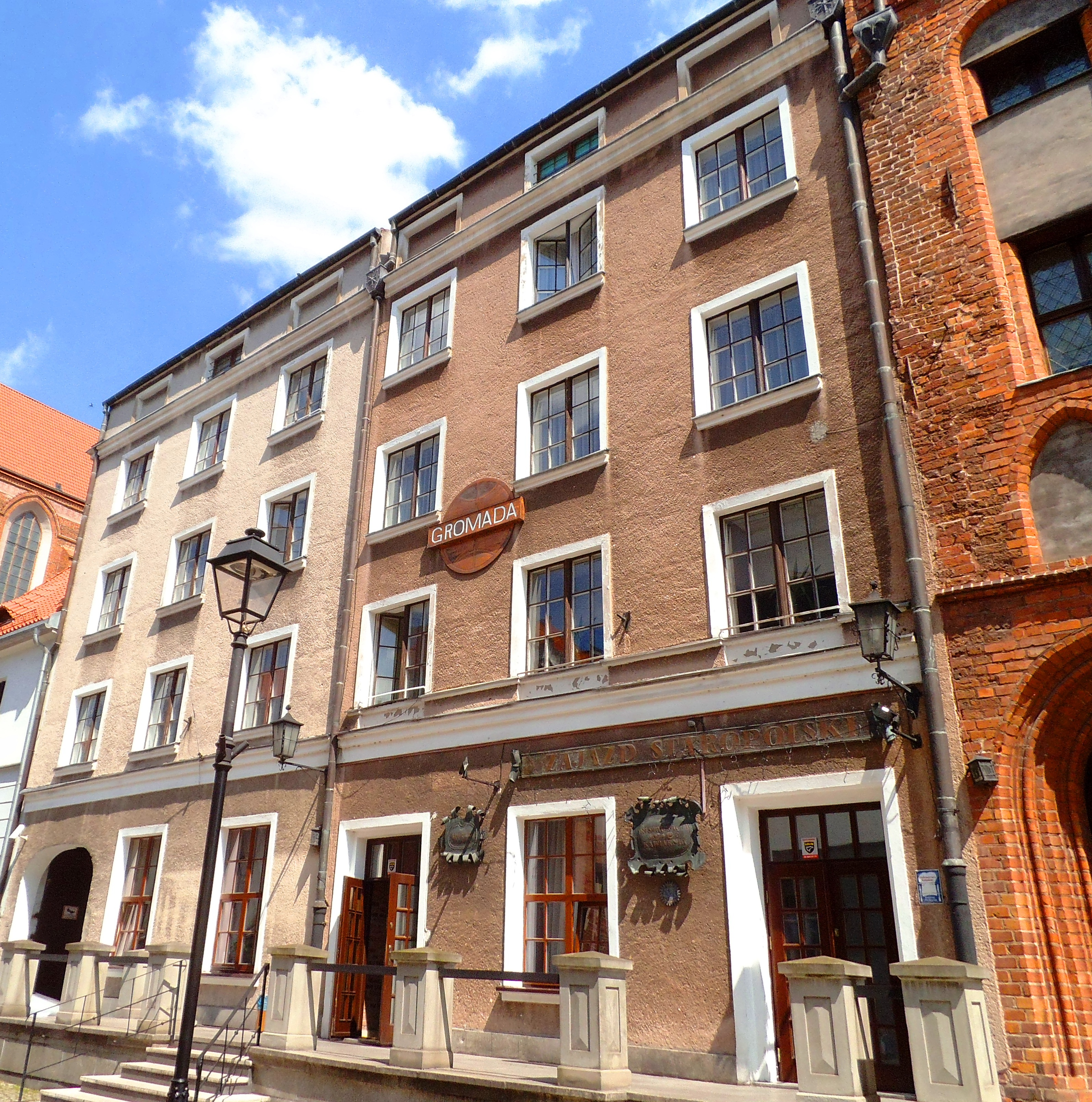 Hotel Gromada w Toruniu, lato 2017